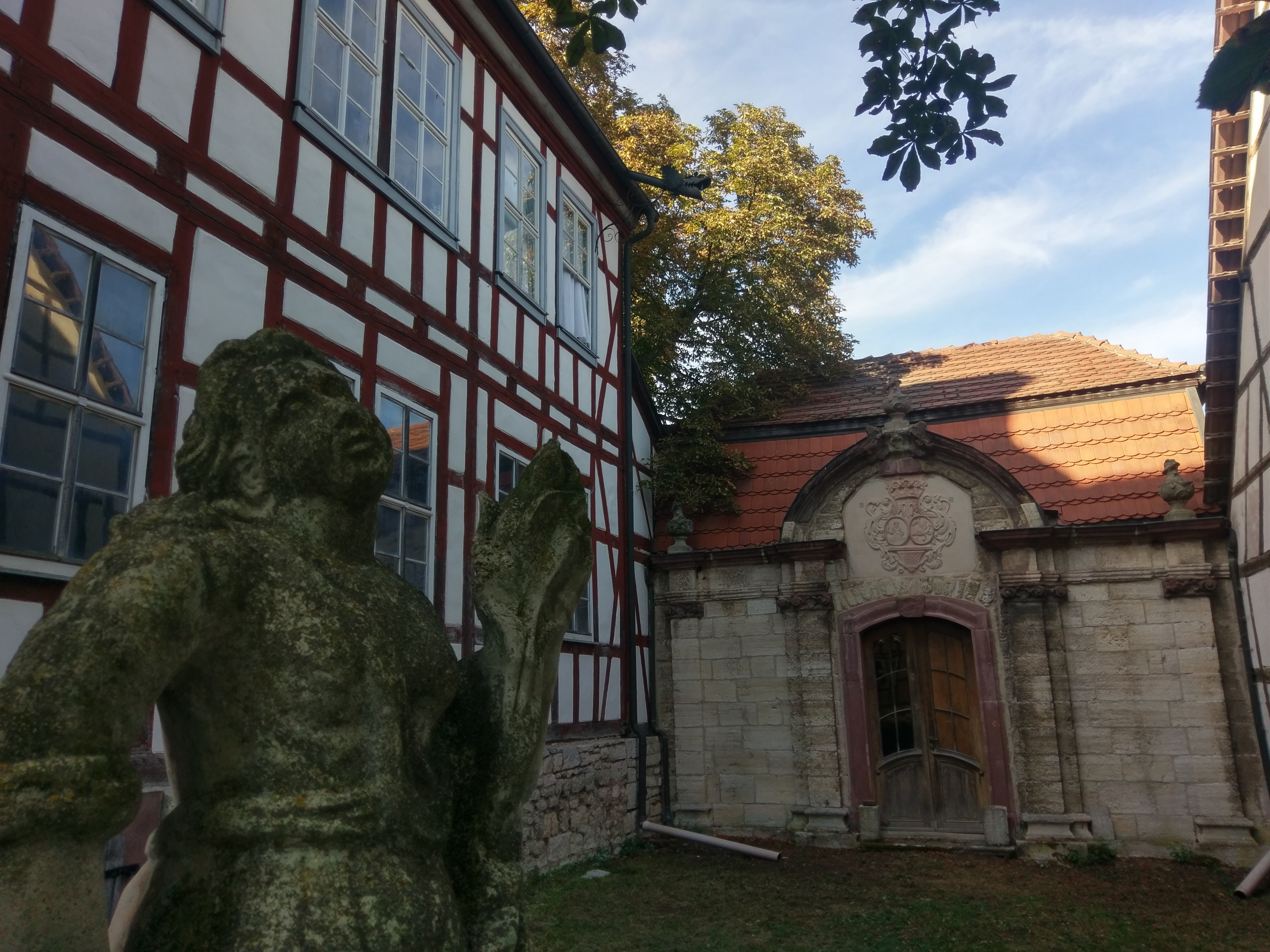 Blick auf die Bibliothek, links das Haupthaus.Im Giebelfeld des Ziergiebels das Allianzwappen von Wilke/von Wurmb